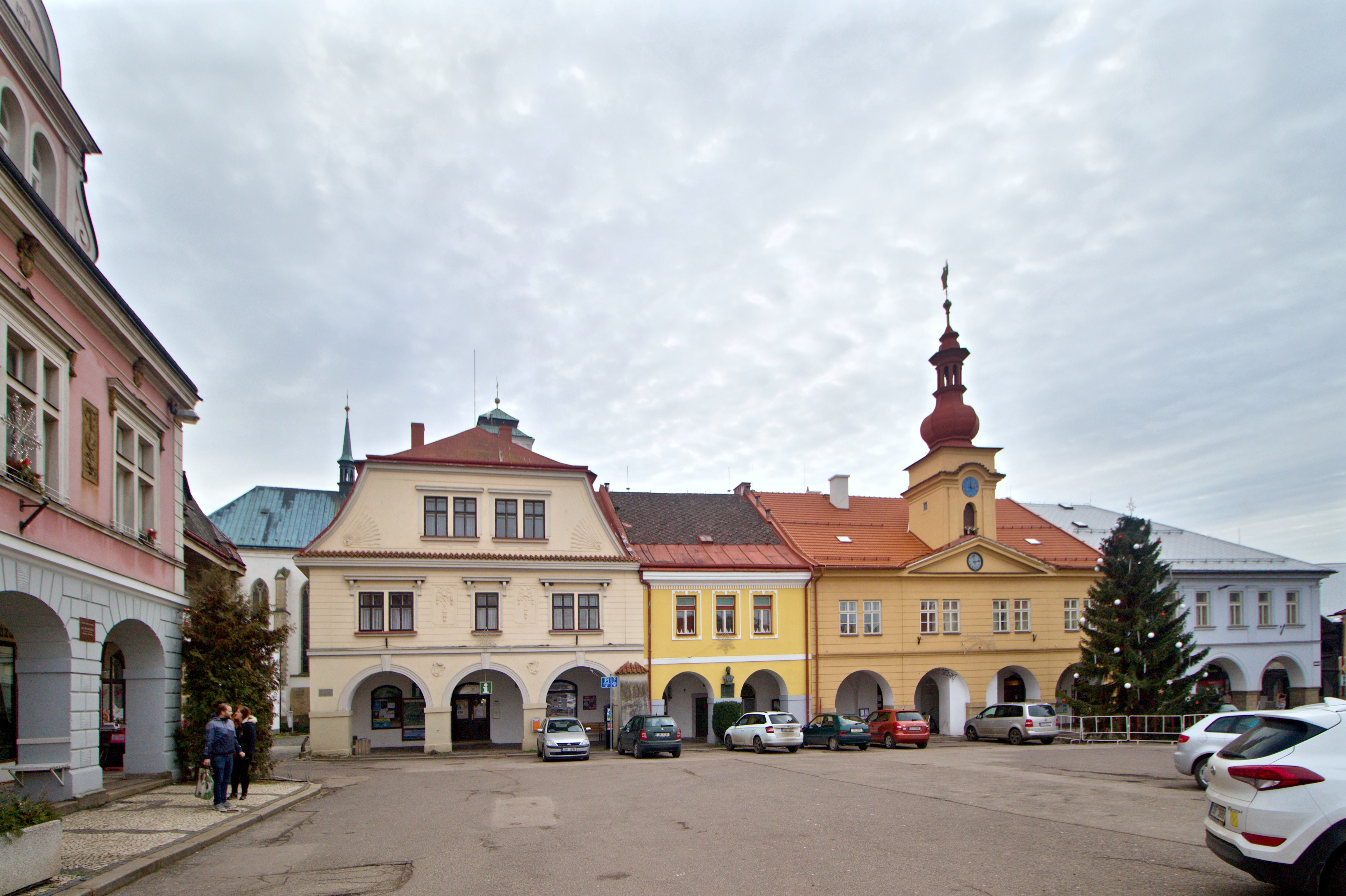 Sobotka